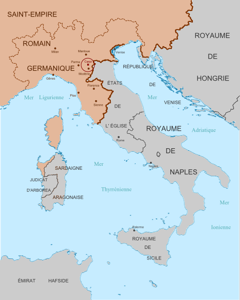 Seigneurie de Carpi - Situation dans l'Italie de 1350.